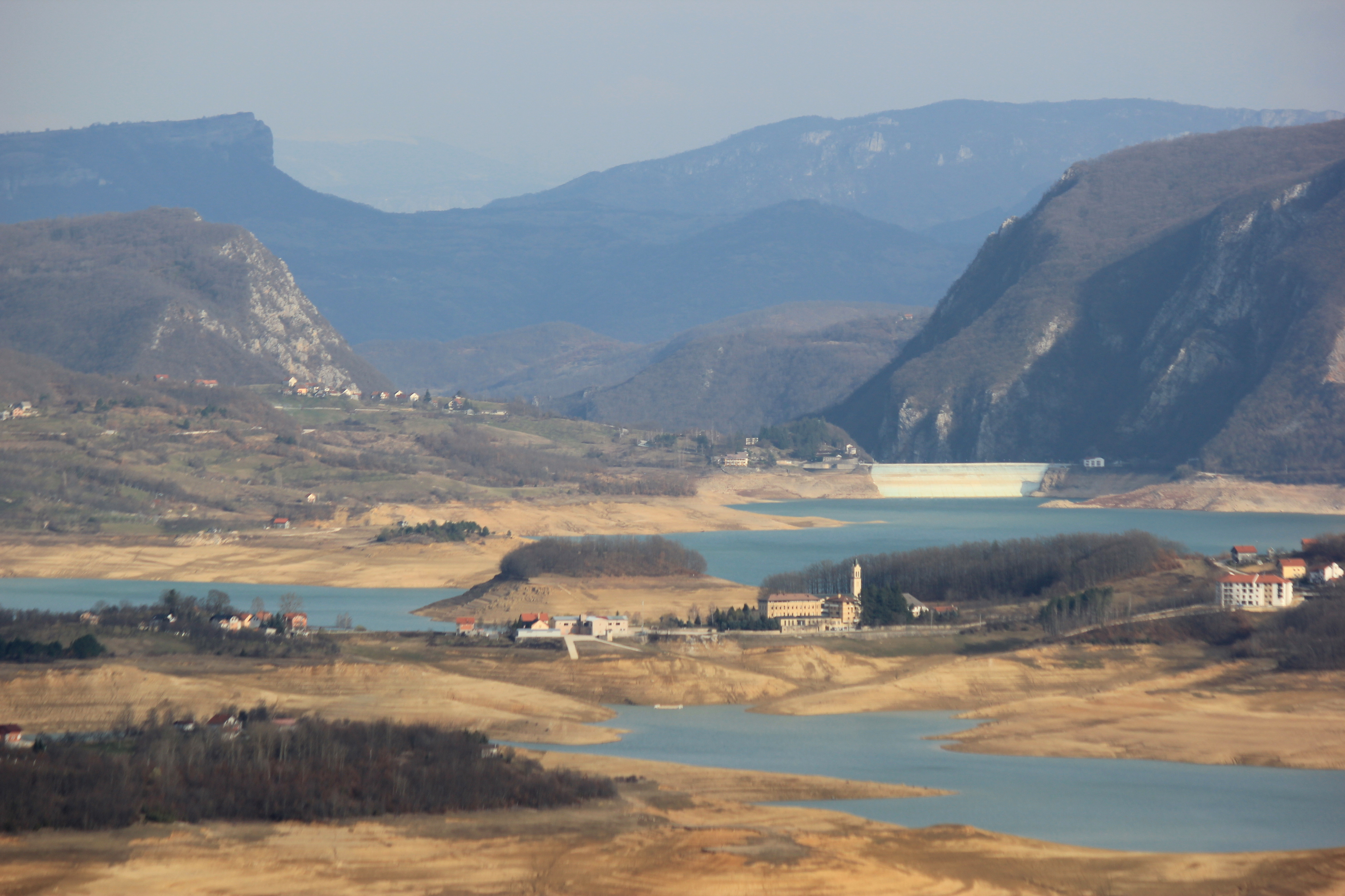 Blick auf den Rama-Stausee, Gemeinde Prozor-Rama, Bosnien und Herzegowina.